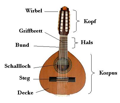 Instrument Bandurria mit Beschreibung